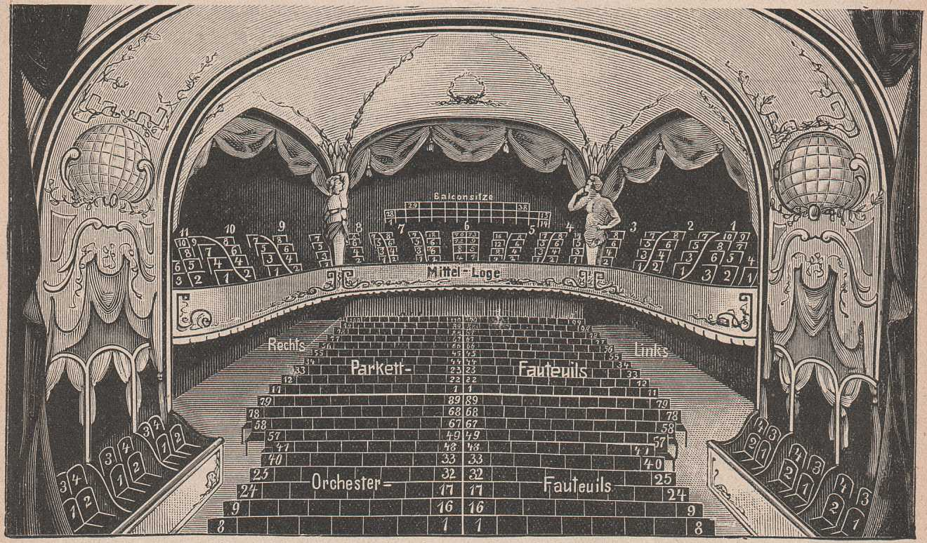 Rudolph Hertzog, Agenda 1912. Jahreskalender des Berliner Kaufhauses. Seite 102. Lustspielhaus in Berlin SW, Friedrichstraße 236. Leinen, 224 Seiten, 19,5 x 28,5 cm